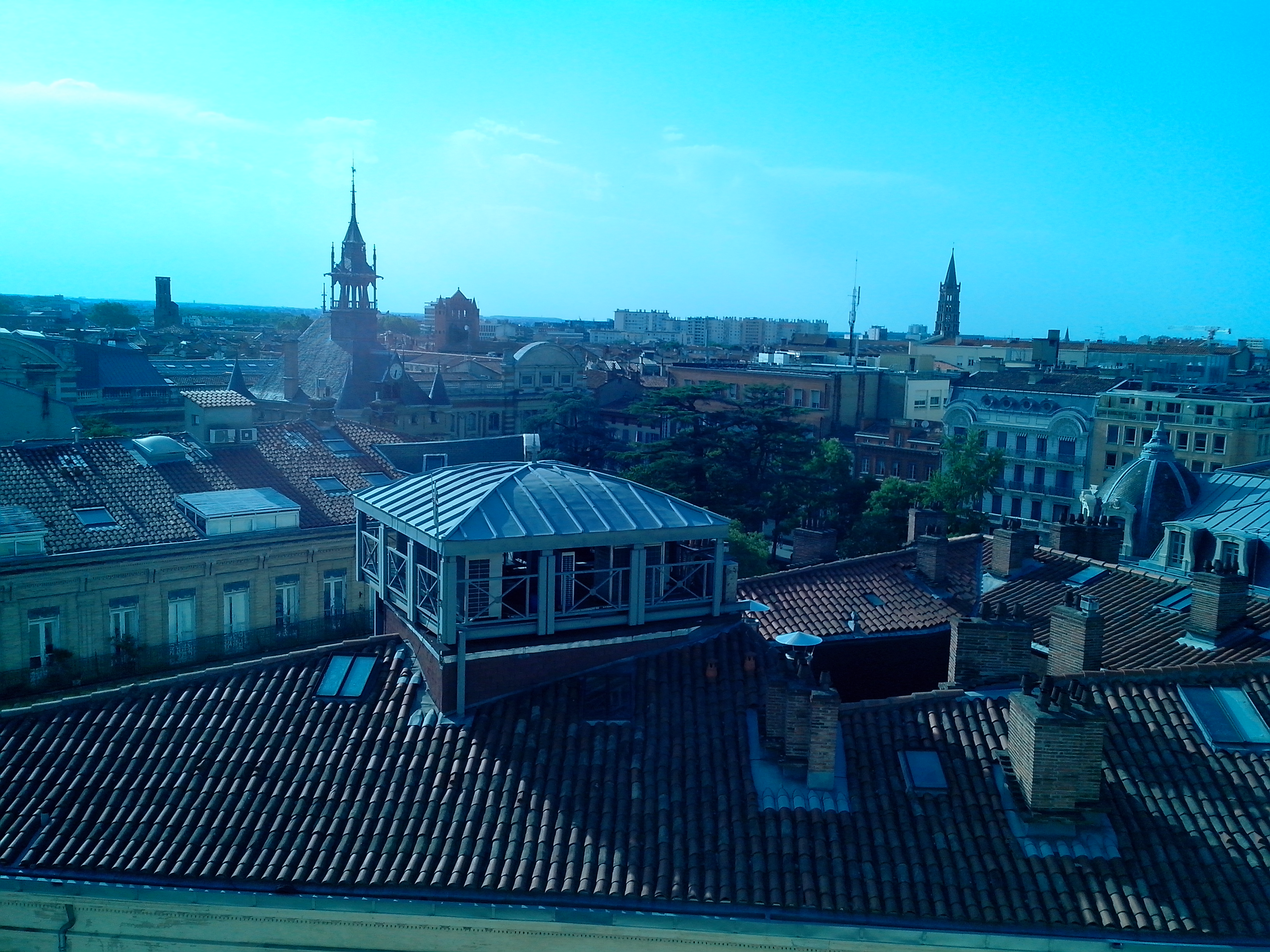 Photo prise depuis la terrasse des Galeries La Fayette